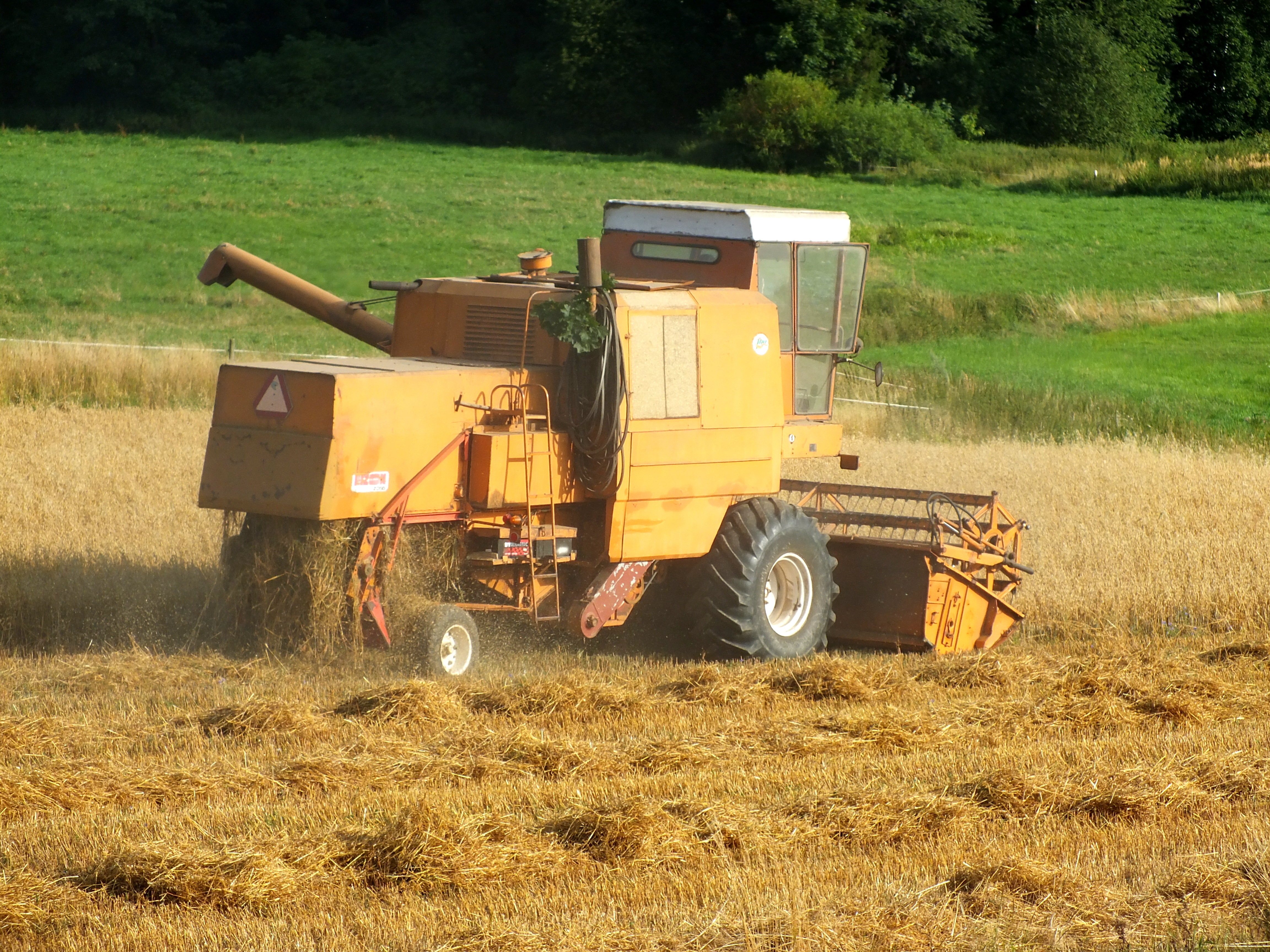 Bizon – kombajn rolniczy